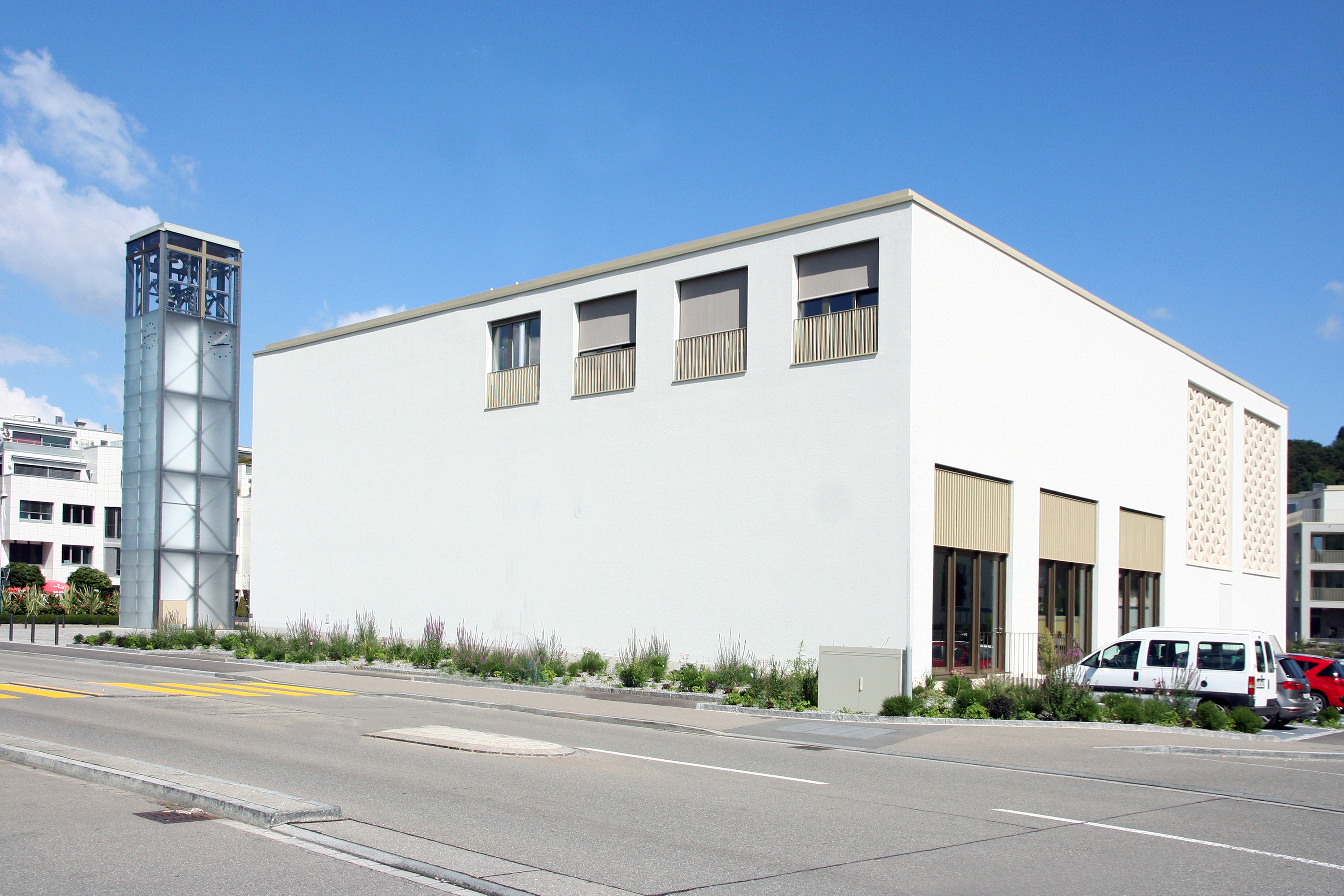 röm.-kath. Kirche Bonstetten ZH